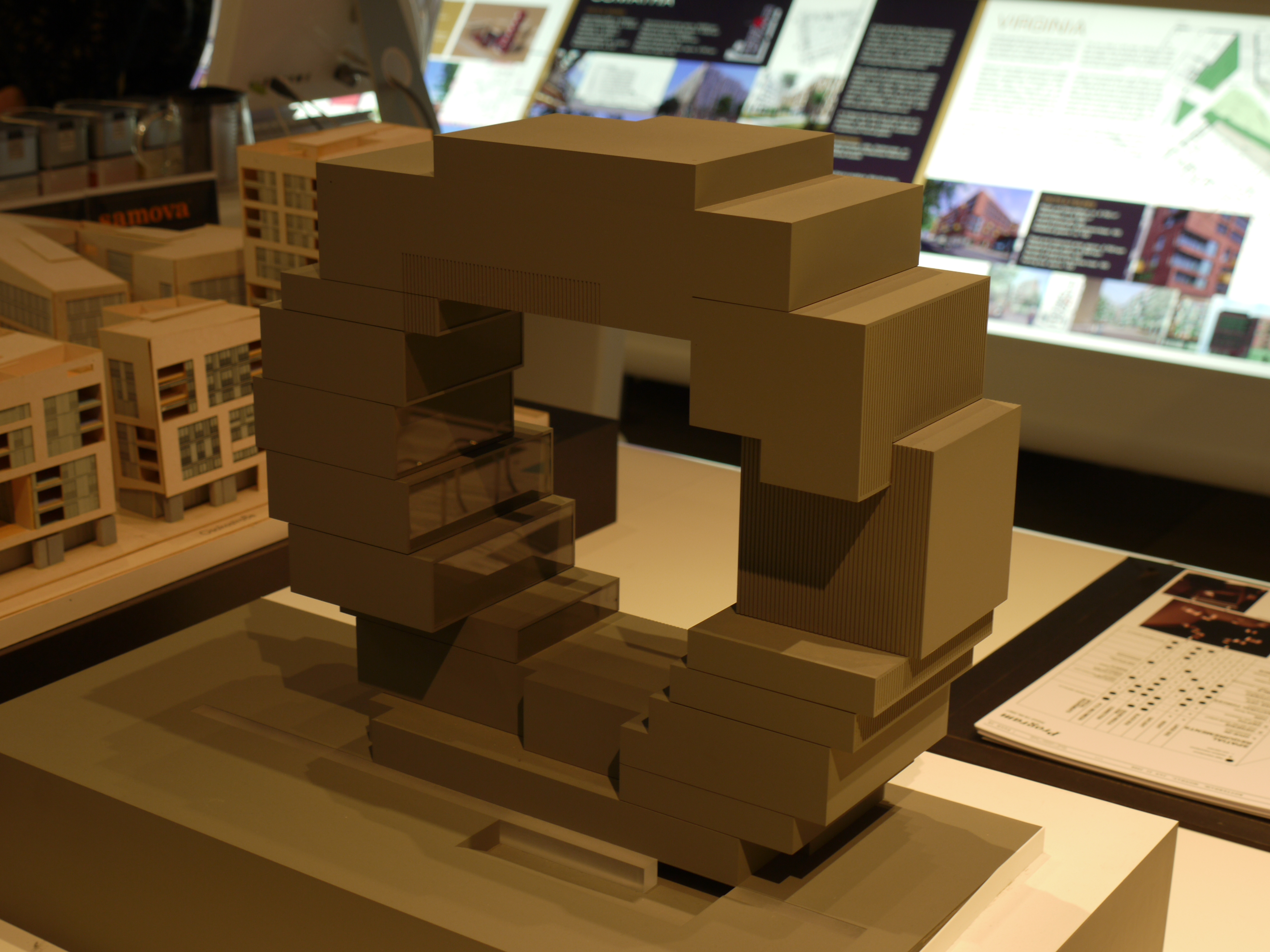 Modell des geplanten Science Centers in Hamburg.